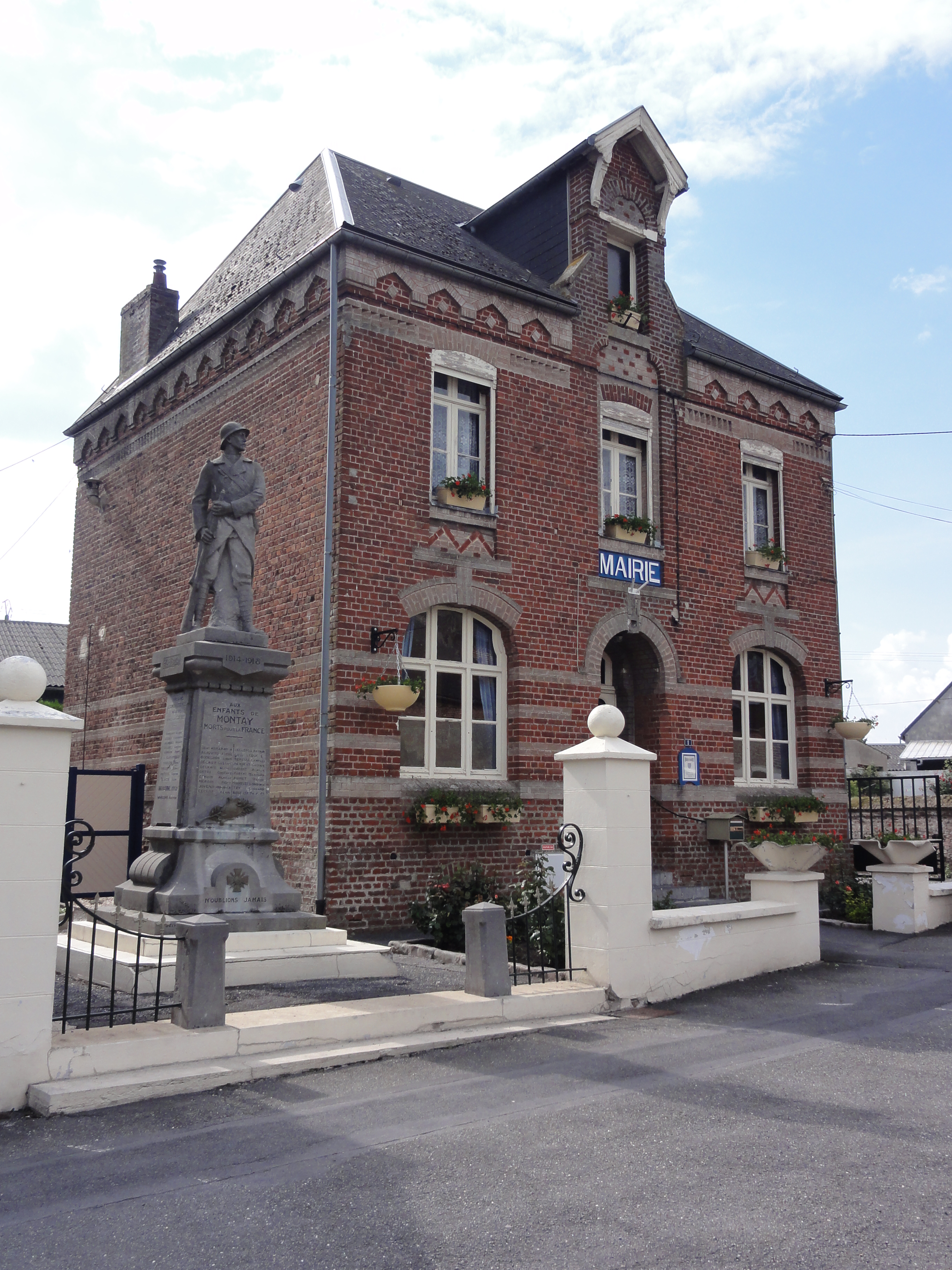 Montay (Nord, Fr) mairie et monument aux morts